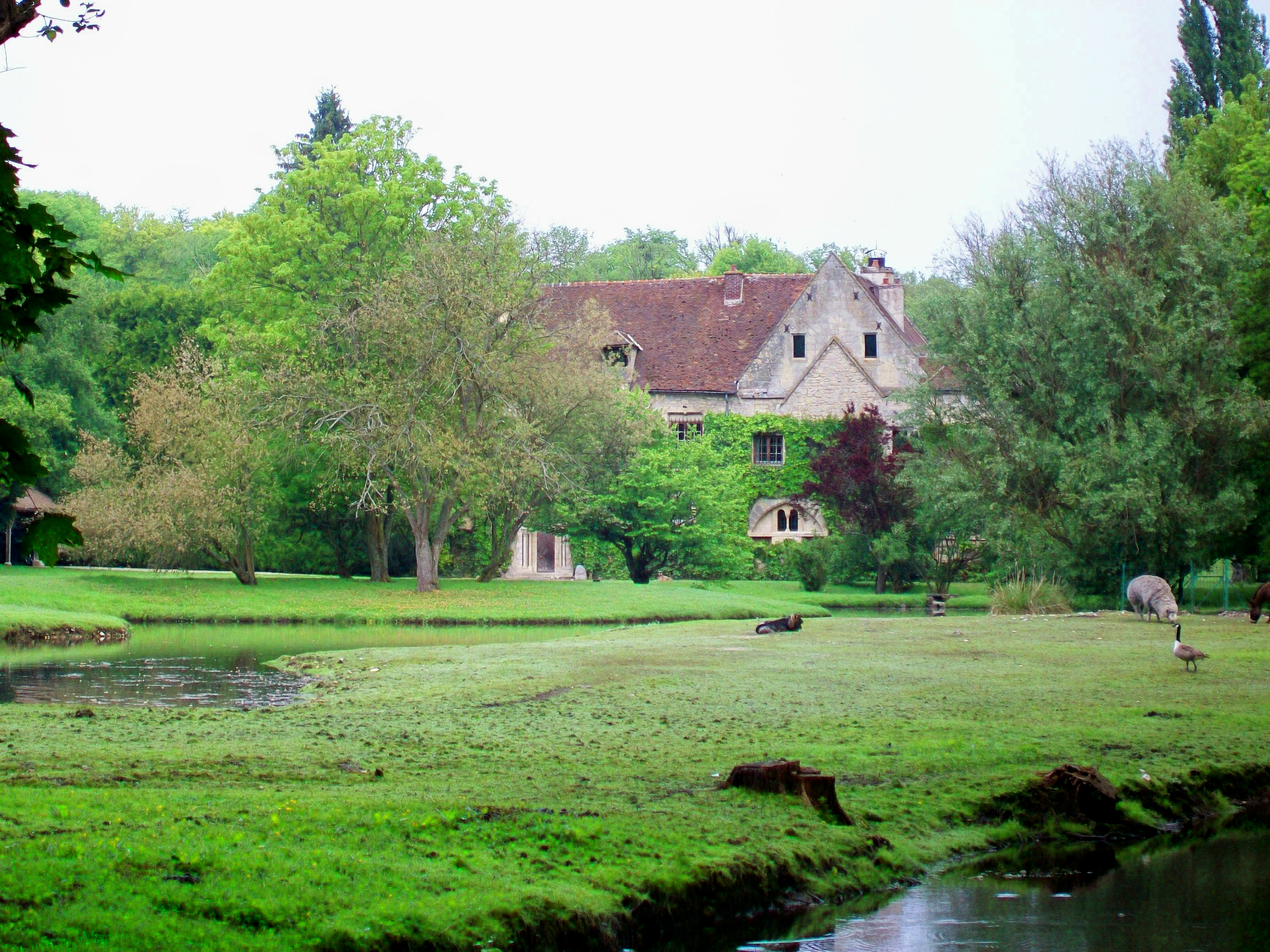 Le corps de logis de l'ancienne grange de l'abbaye de Chaalis, au lieu-dit Com(m)elle(s), à Orry-la-Ville (60). Façade principale vers le sud-est. Le bâtiment date au moins partiellement du XIIIe siècle. Propriété de l'Institut de France, il est loué à un particulier et ne se visite pas. Non inscrit ou classé Monuments historiques (2011).